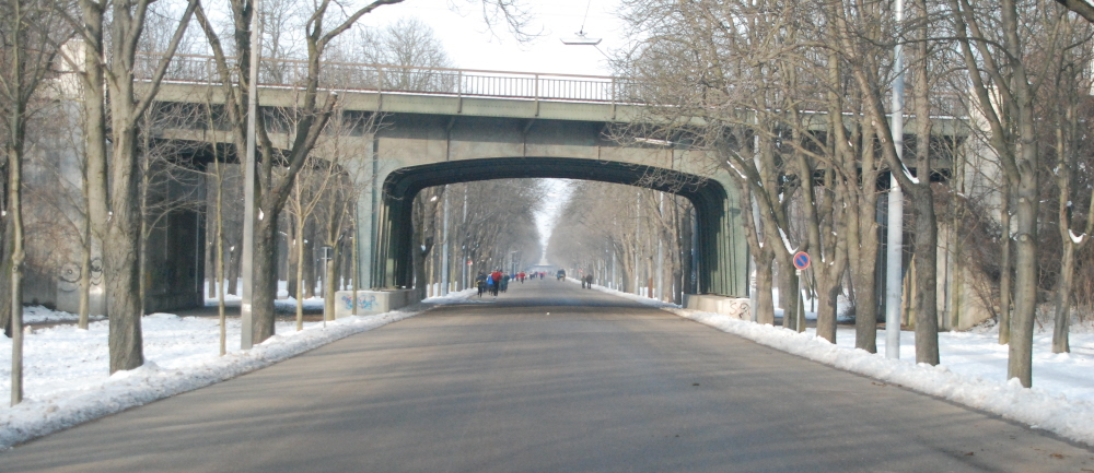 Die Brücke der Ostbahn über die Hauptallee im 2. Wiener Gemeindebezirk Leopoldstadt, Blick entlang der Hauptallee Richtung Norden.